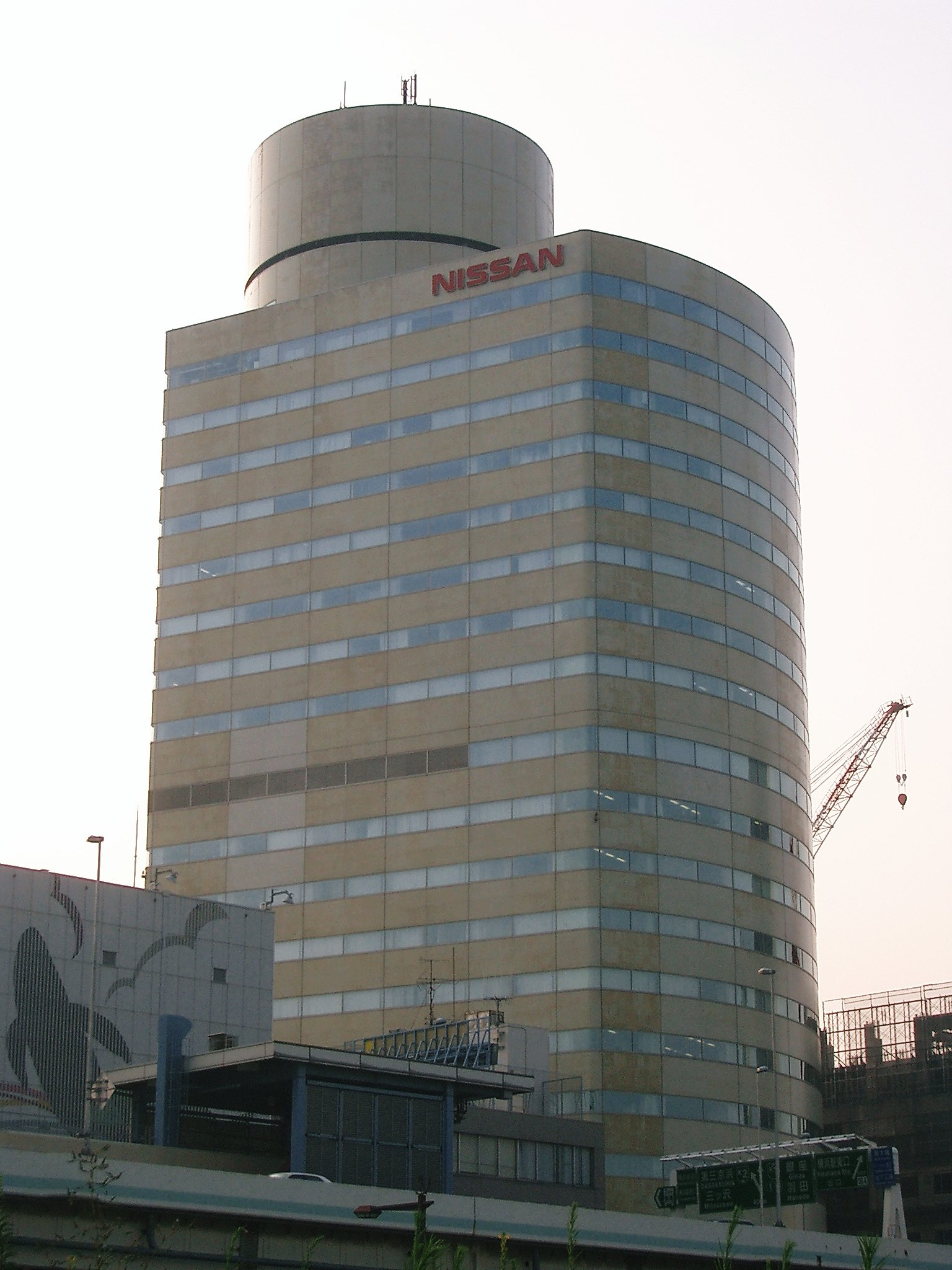 Nissan Yokohama Building 日産横浜ビル